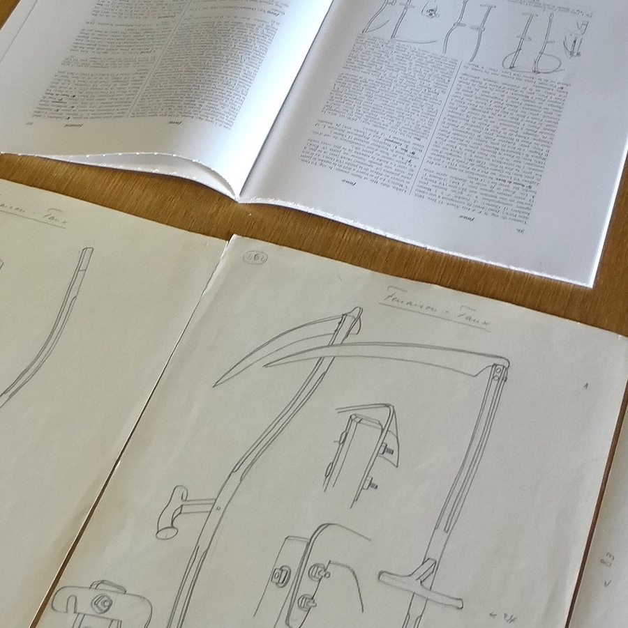 Dessins de Paul Boesch destinés à illustrer le Glossaire des patois de la Suisse romande, concernant le vocabulaire entourant la « faux ».